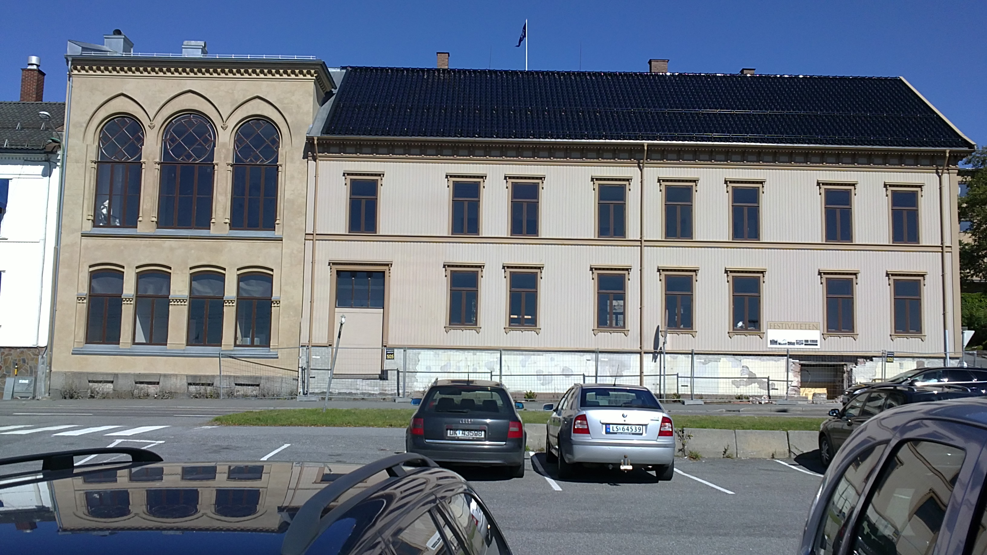 Bilde av Festiviteten, Larvik